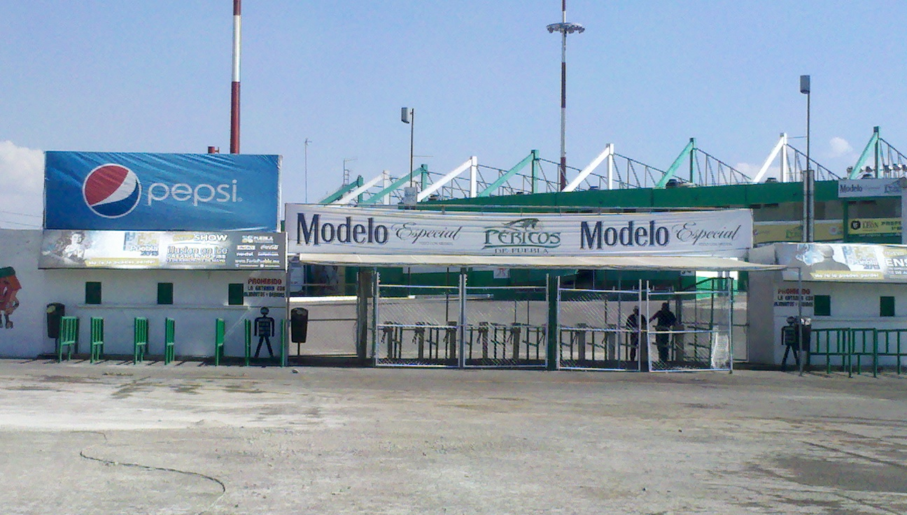 Estadio Hermanos Serdán de béisbol, Puebla, México.